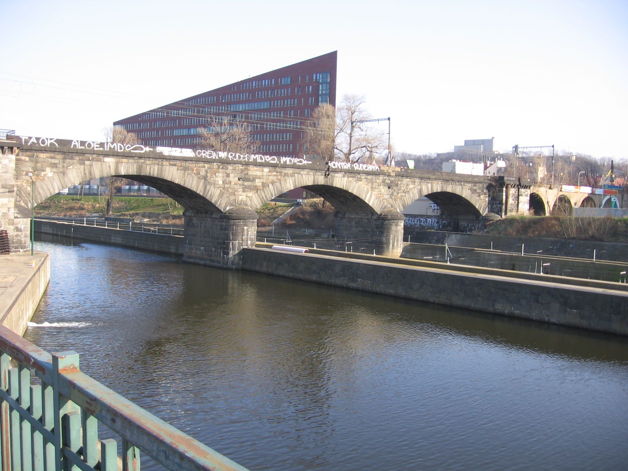 Negrelliho viadukt nad pravým ramenem Vltavy